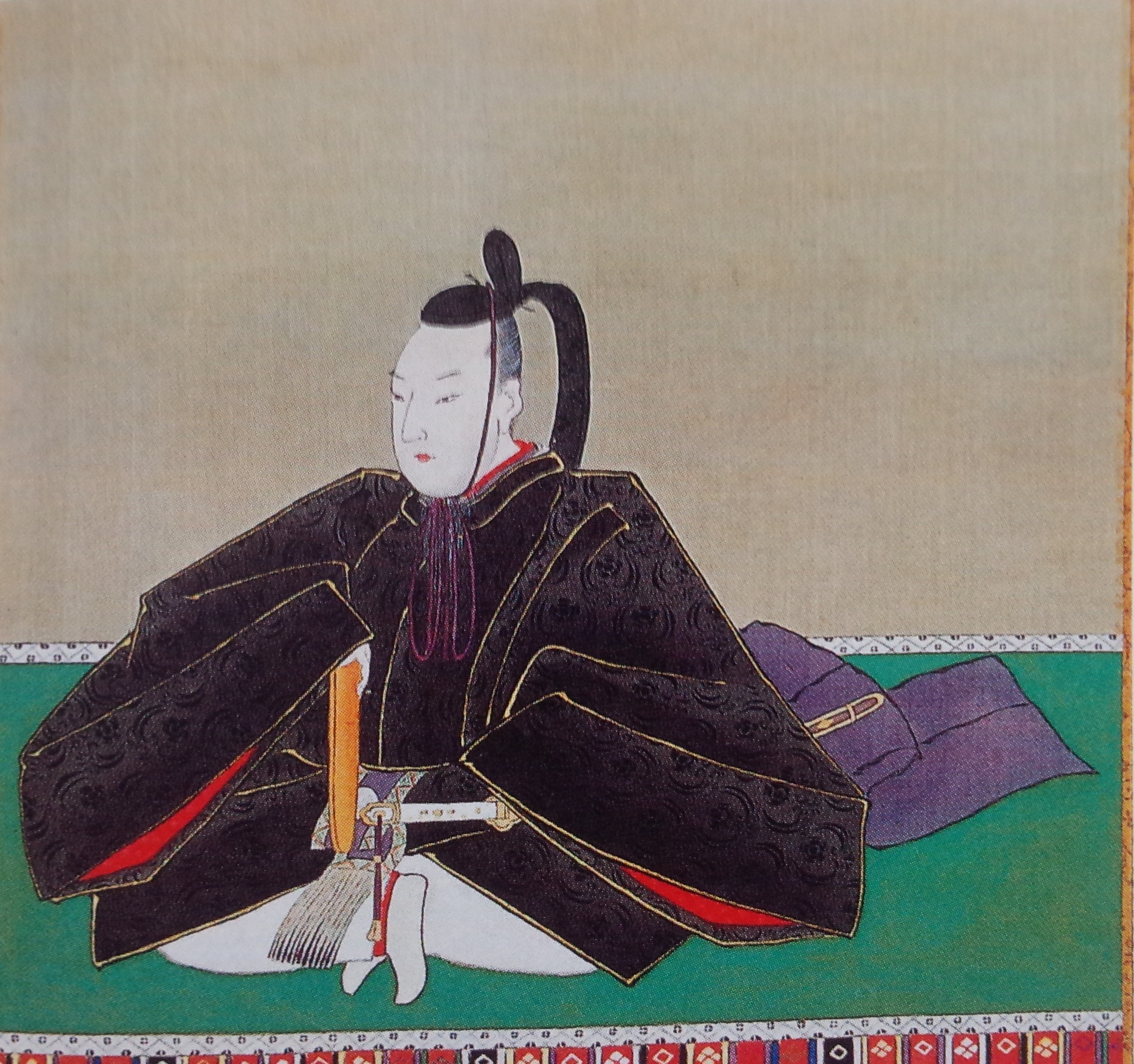 南部利敬の肖像。